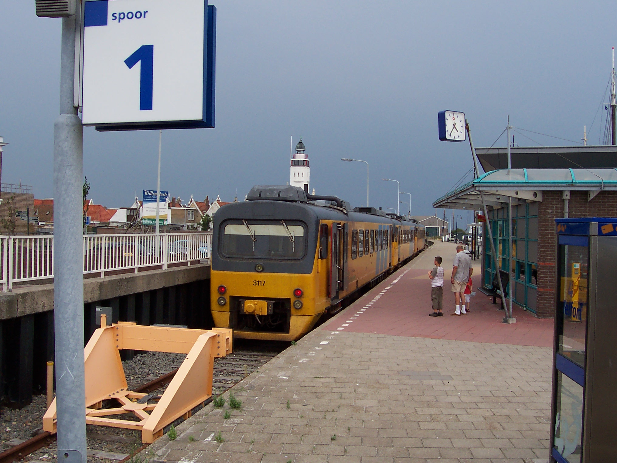 Harlingen - Bahnhof Harlingen Hafen mit dem Zug nach LeeuwardenFrysk: Harns - Stasjon Harns Haven mei de trein nei Ljouwert